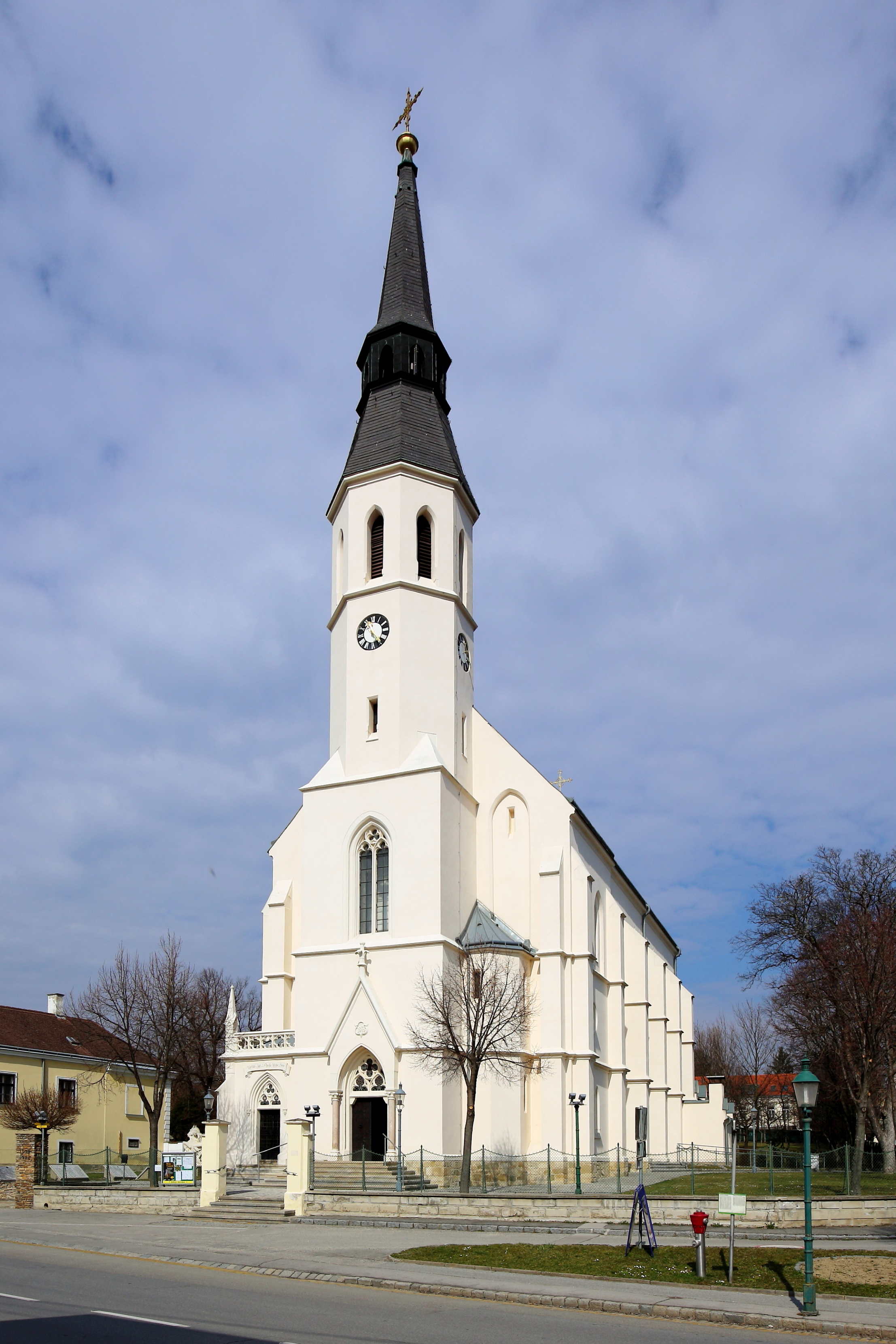 Südsüdostansicht der katholischen Pfarrkirche hl. Jakobus der Ältere in der niederösterreichischen Marktgemeinde Bockfließ. Eine neugotische Saalkirche mit Fassadenturm und Nordchor, die von 1874 bis 1876 errichtet wurde.